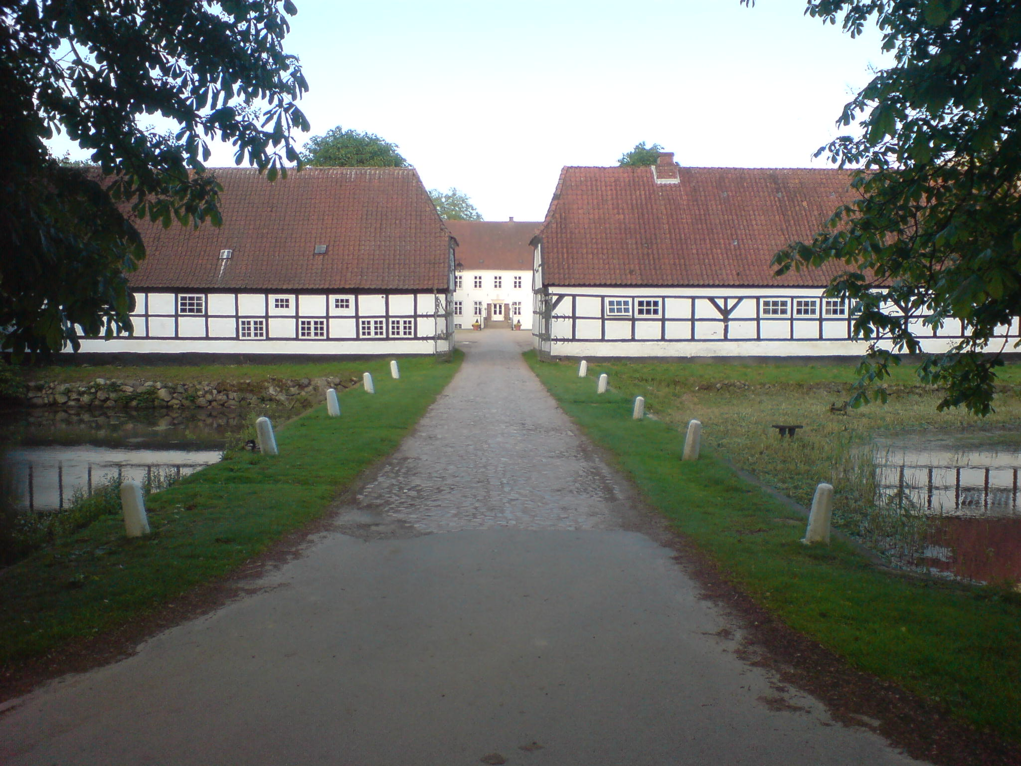 Blick von der Straße in das Gut Wulfshagen